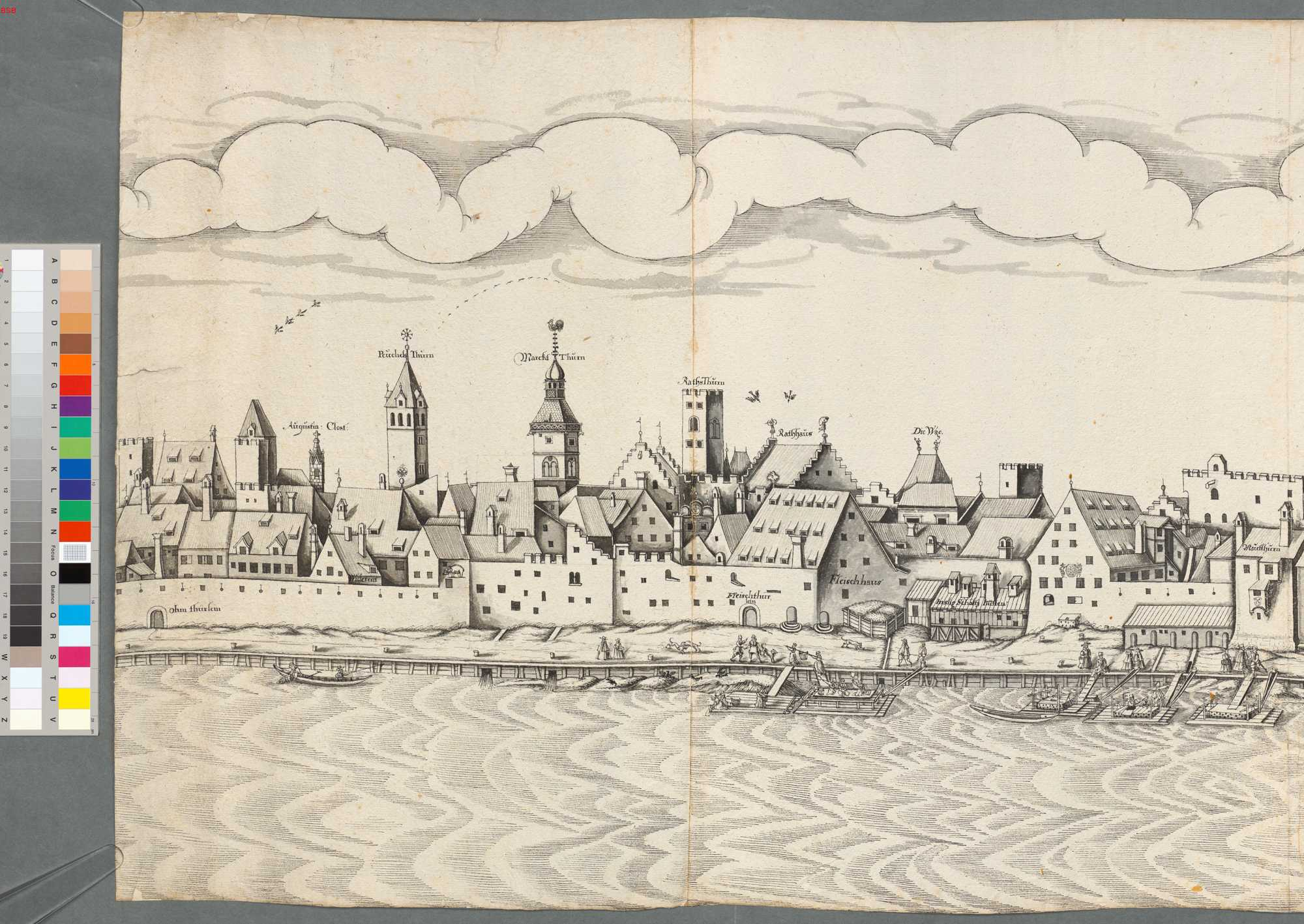 Abriß der Stadt Regensburg östlich und westlich der Steinernen Brücke. Bezeichnungen: Augustin Clost (Augustiner-Kloster), Peuchels Thurn (Goldener Turm), Marckt Thurn (Markt-Turm 1706 abgebrannt), Raths Thurn, (Rathaus-Turm), Rathhaus, Fleischthur, Die Wac(?) (Neue Waag), Fleischhaus, (Schlachthaus), Inslic Schoss(?) Hütten (Schmelzhütte für Talg ?), Mauththurn (Maut-Turm) Goldener Turm Altes Rathaus